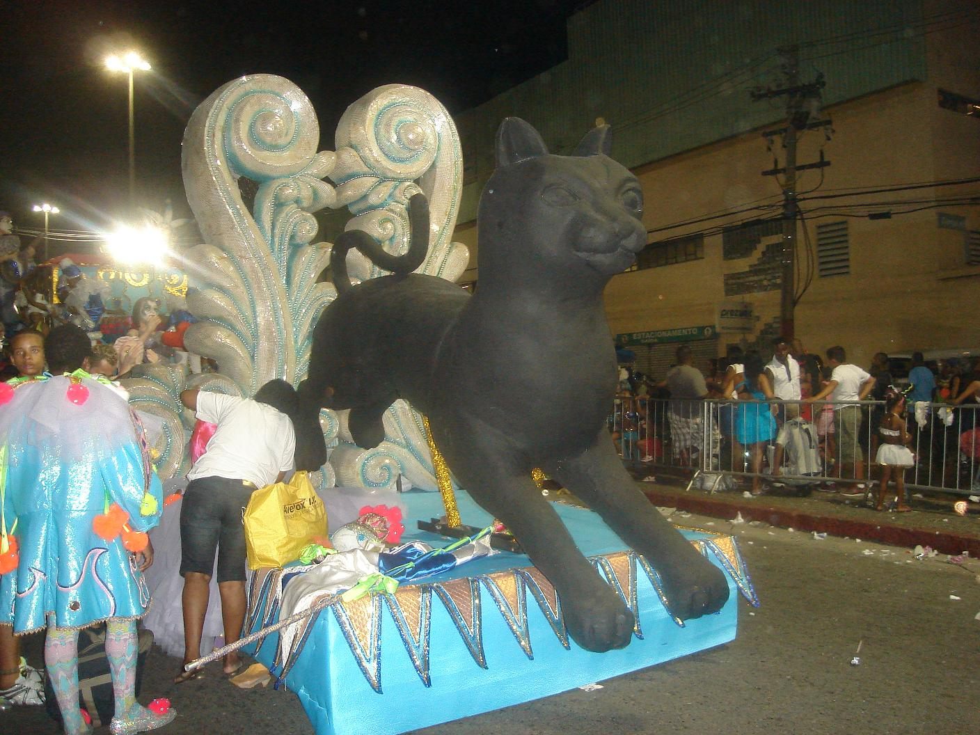 GRES Gato de Bonsucesso